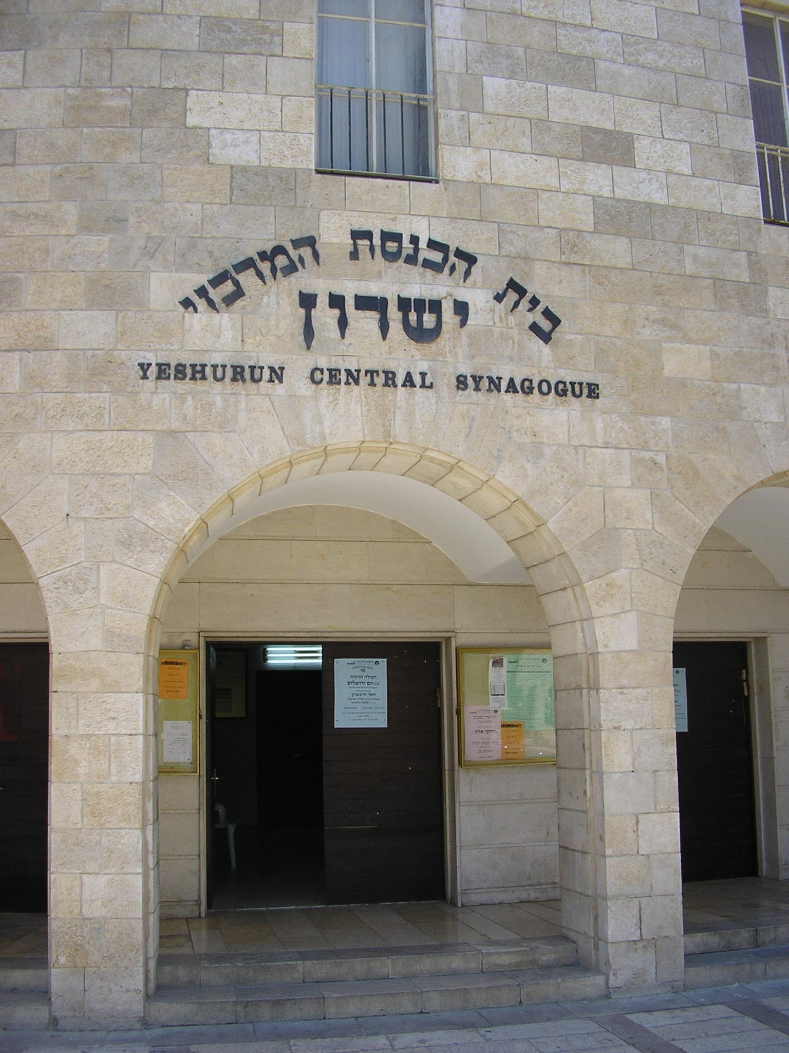 הכניסה לבית הכנסת "ישורון" בירושלים.